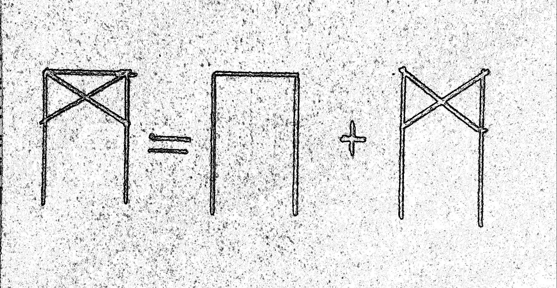 Binderune der Runeninschrift B (ni Wajemāriʀ) aus der e + m Rune des Ortbands vom Thorsberger Moor